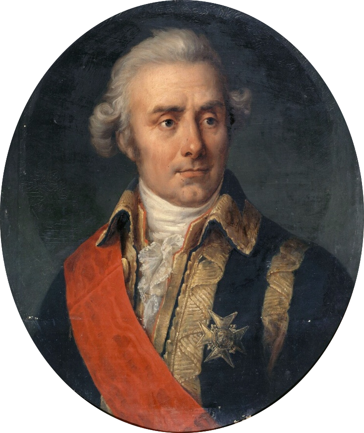 Amiral Louis-Charles, comte du Chaffault (1711-1793)